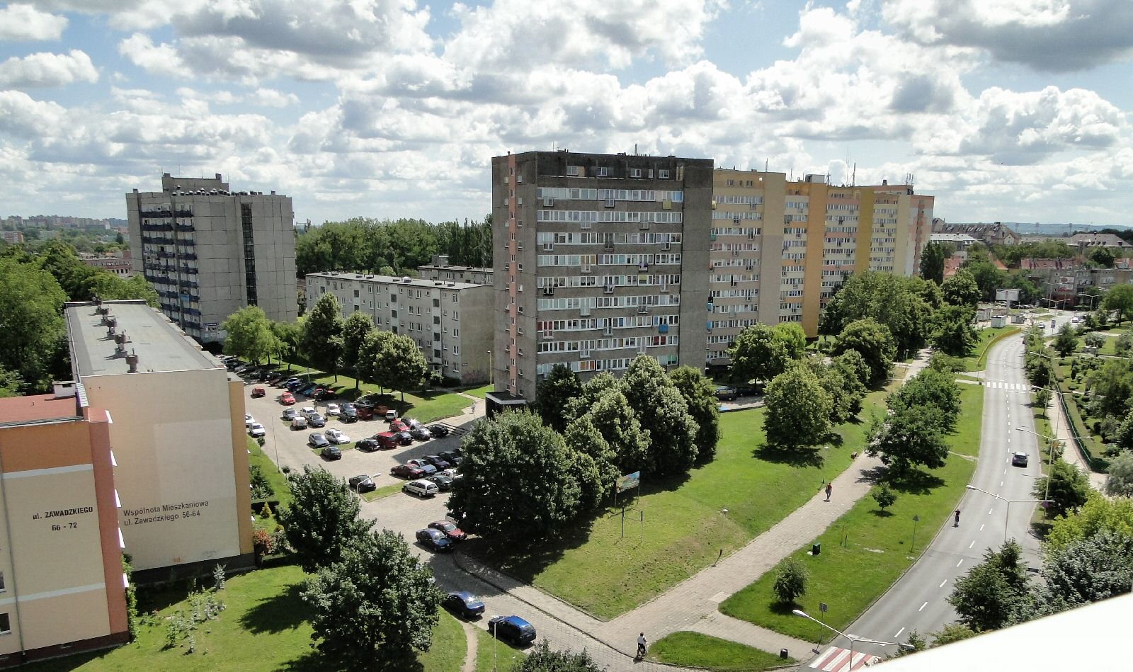 Osiedle Zawadzkiego w Szczecinie